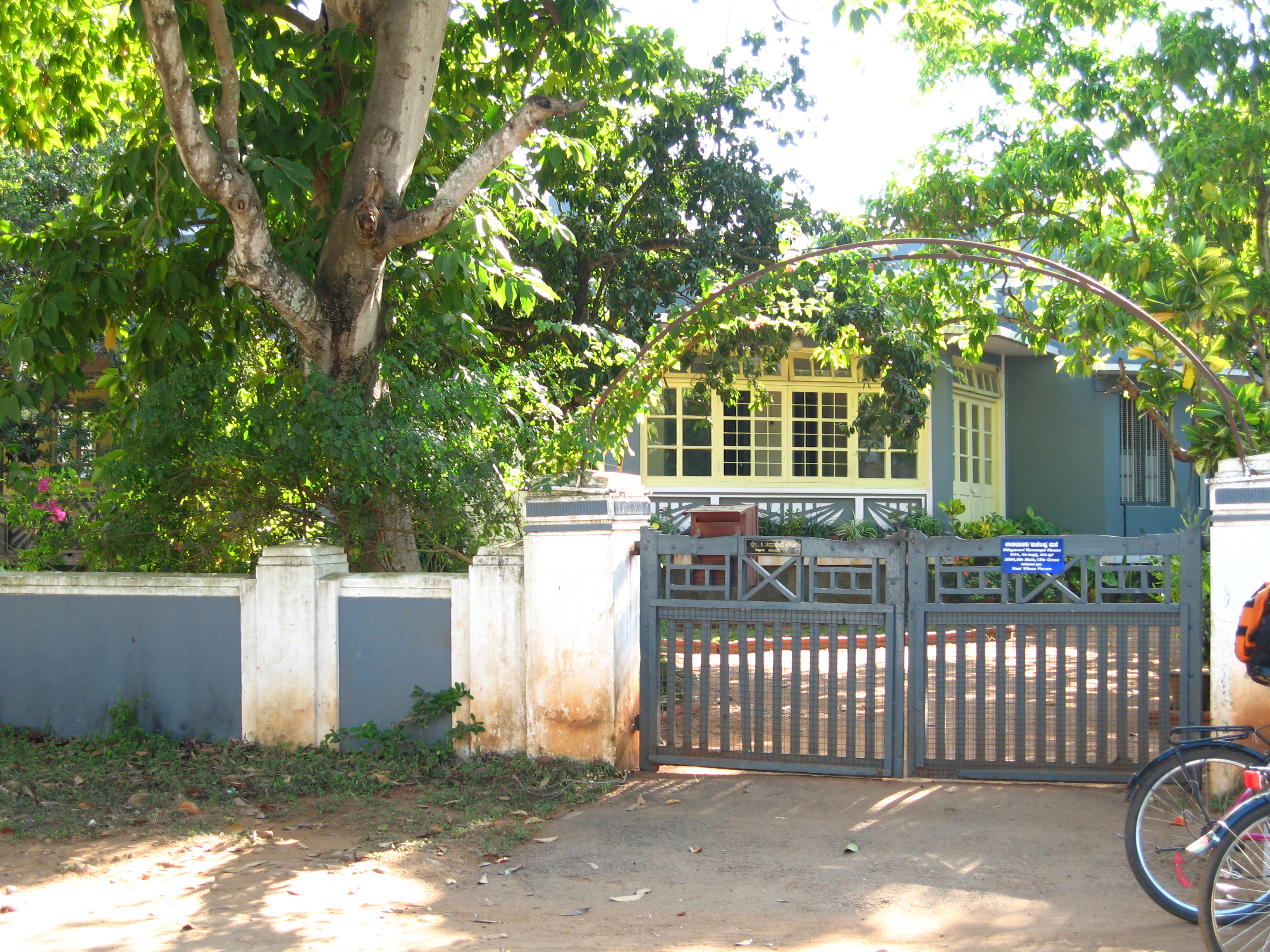 Rashtrakavi Kuvempu's house at Mysuru.